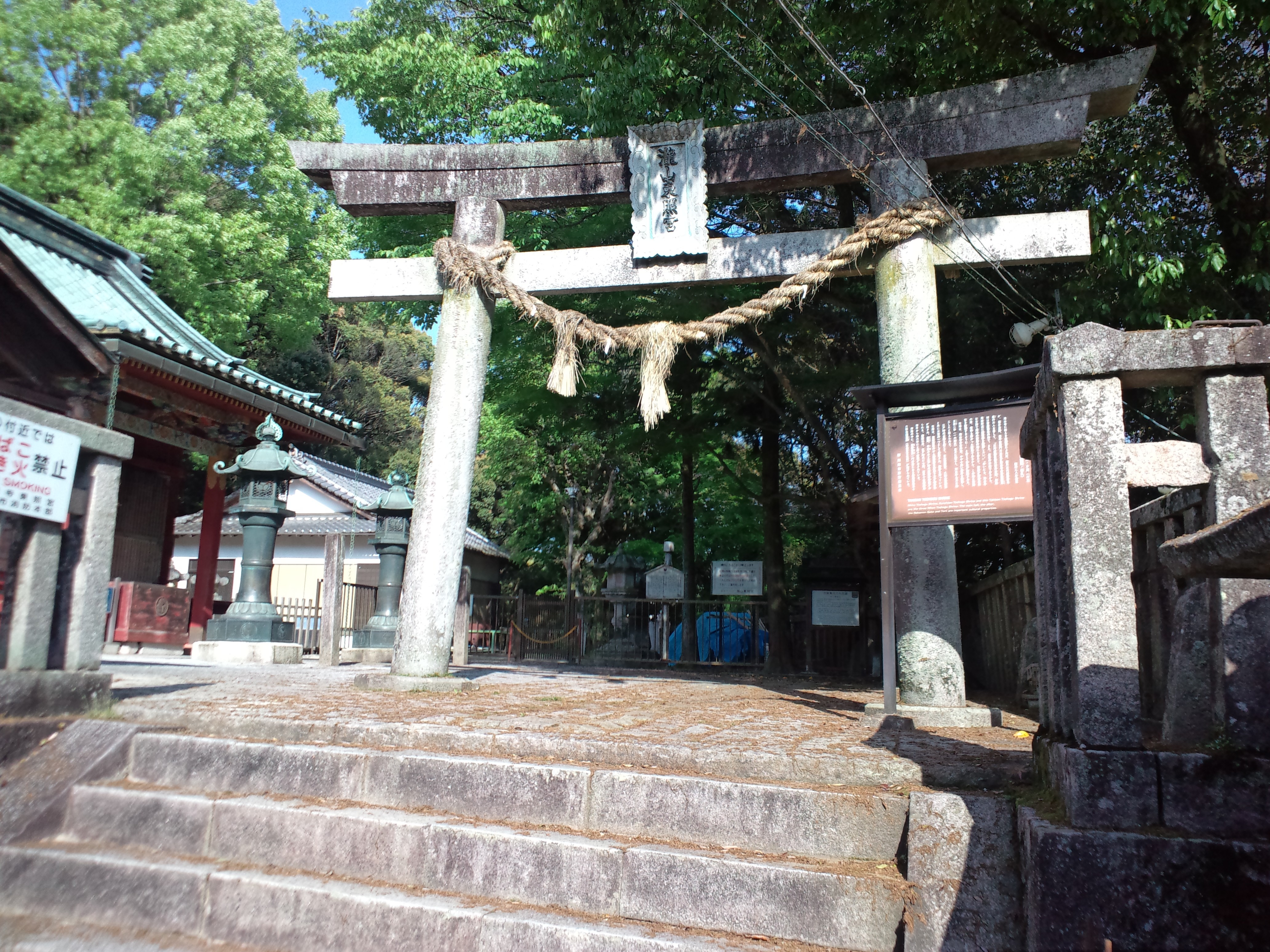 滝山東照宮 石鳥居